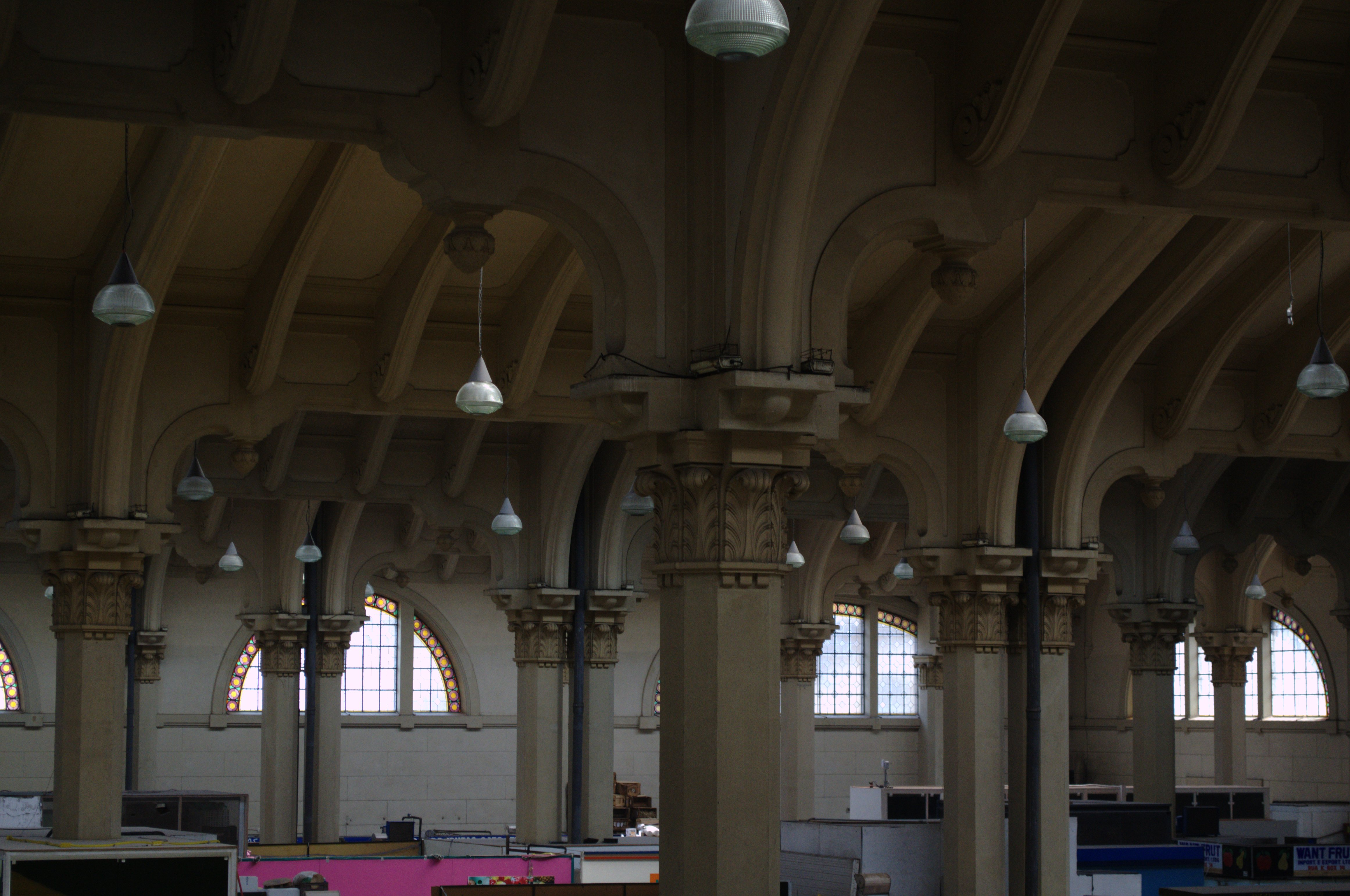 Vista do mezanino do Mercado Municipal de São Paulo, com detalhes nas colunas.